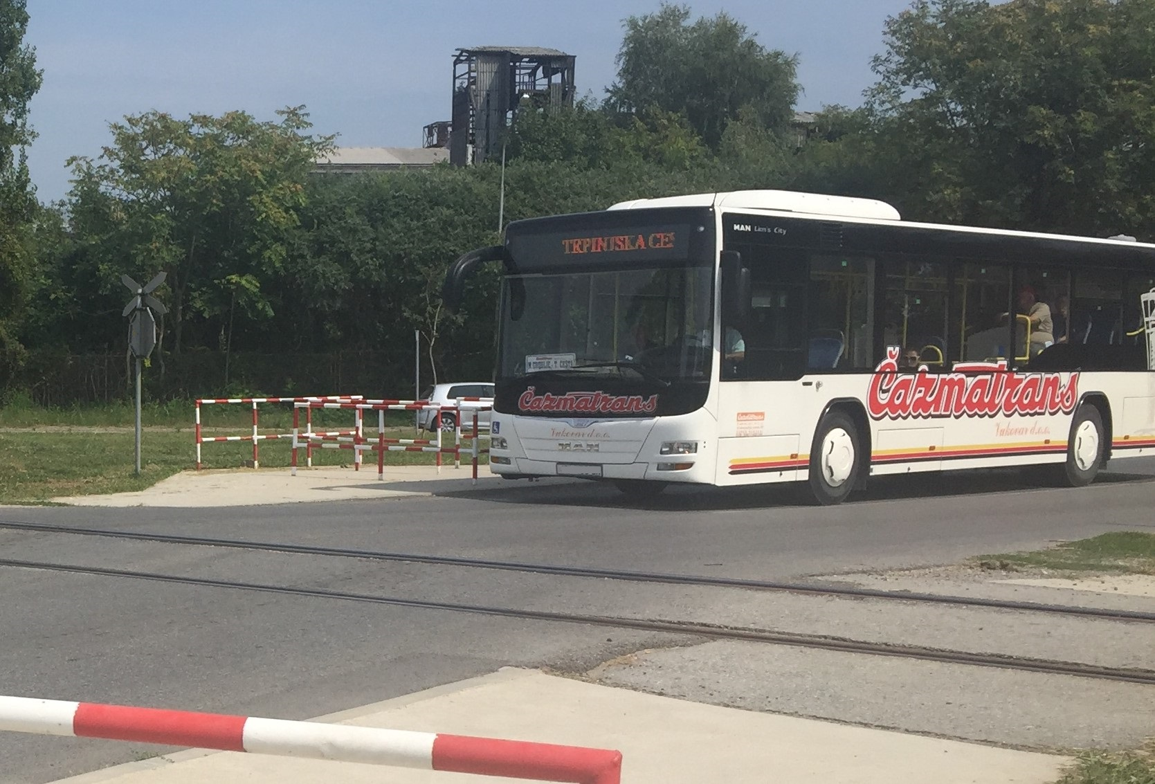 Isječak iz Autobus Čazmatrans Vukovar na prijelazu željezničke pruge u Borovo naselju (Vukovar), 2019.jpg